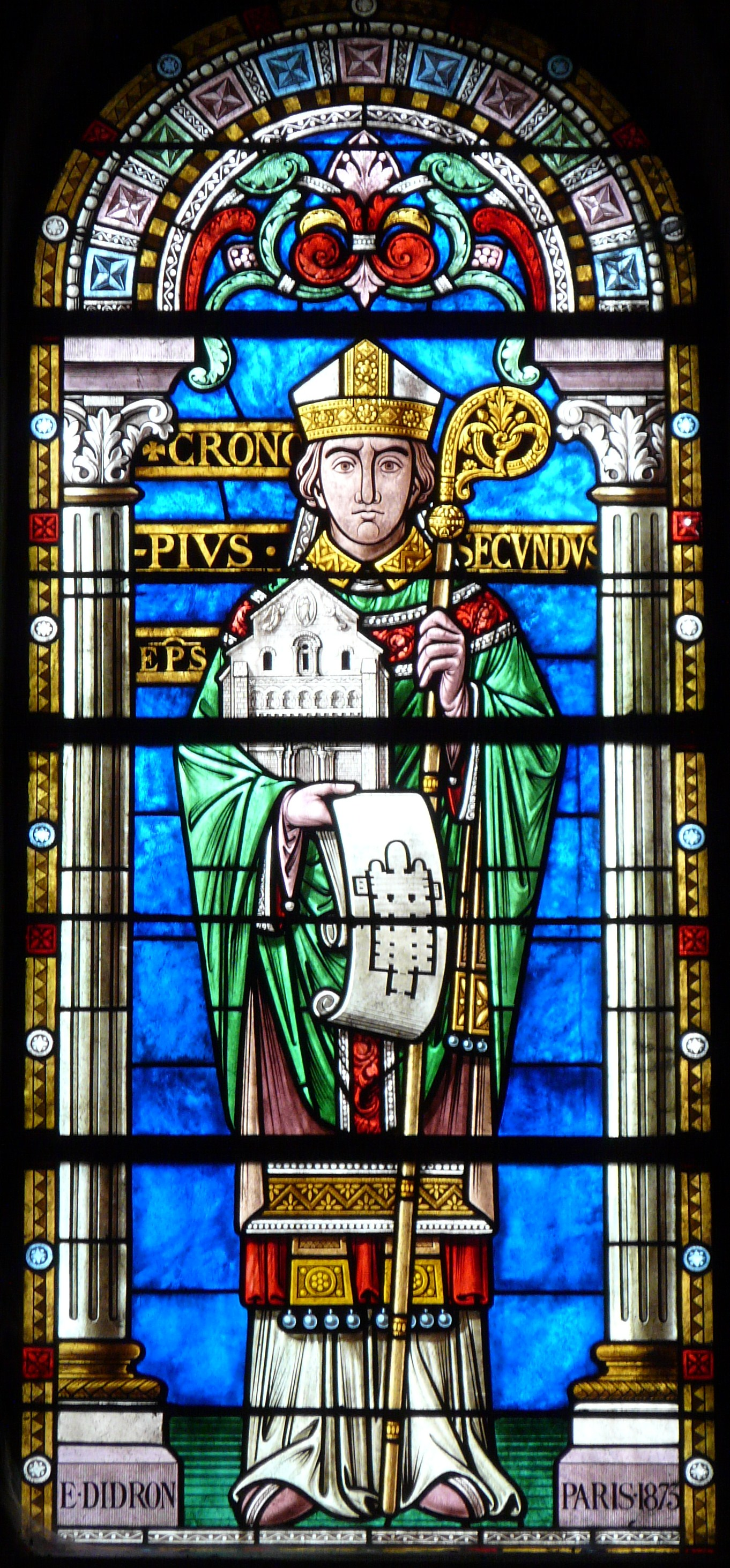 Vitrail de 1873 représentant l'évêque Chronope, absidiole nord-est du chœur, cathédrale Saint-Front, Périgueux, Dordogne, France. Le vitrail est l'œuvre d'Édouard Didron.